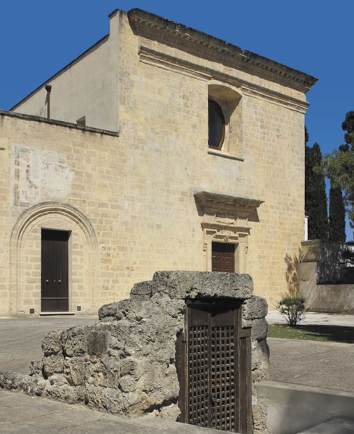 Cripta della Madonna della Favana, Veglie, Lecce, Apulia, Italy